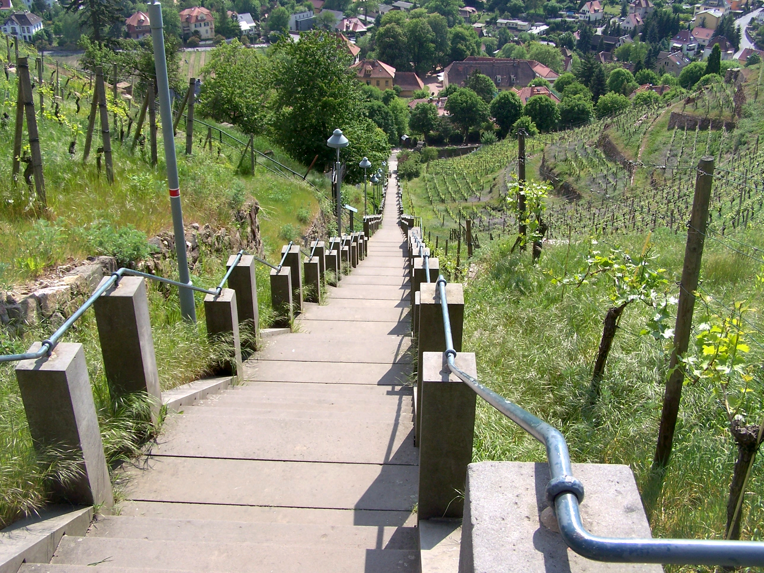 Spitzhaustreppe in Radebeul, Landkreis Meißen